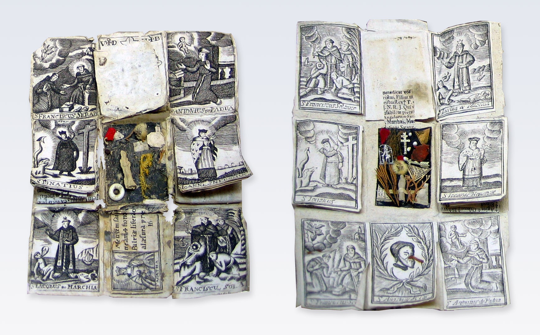 Zwei Breverl